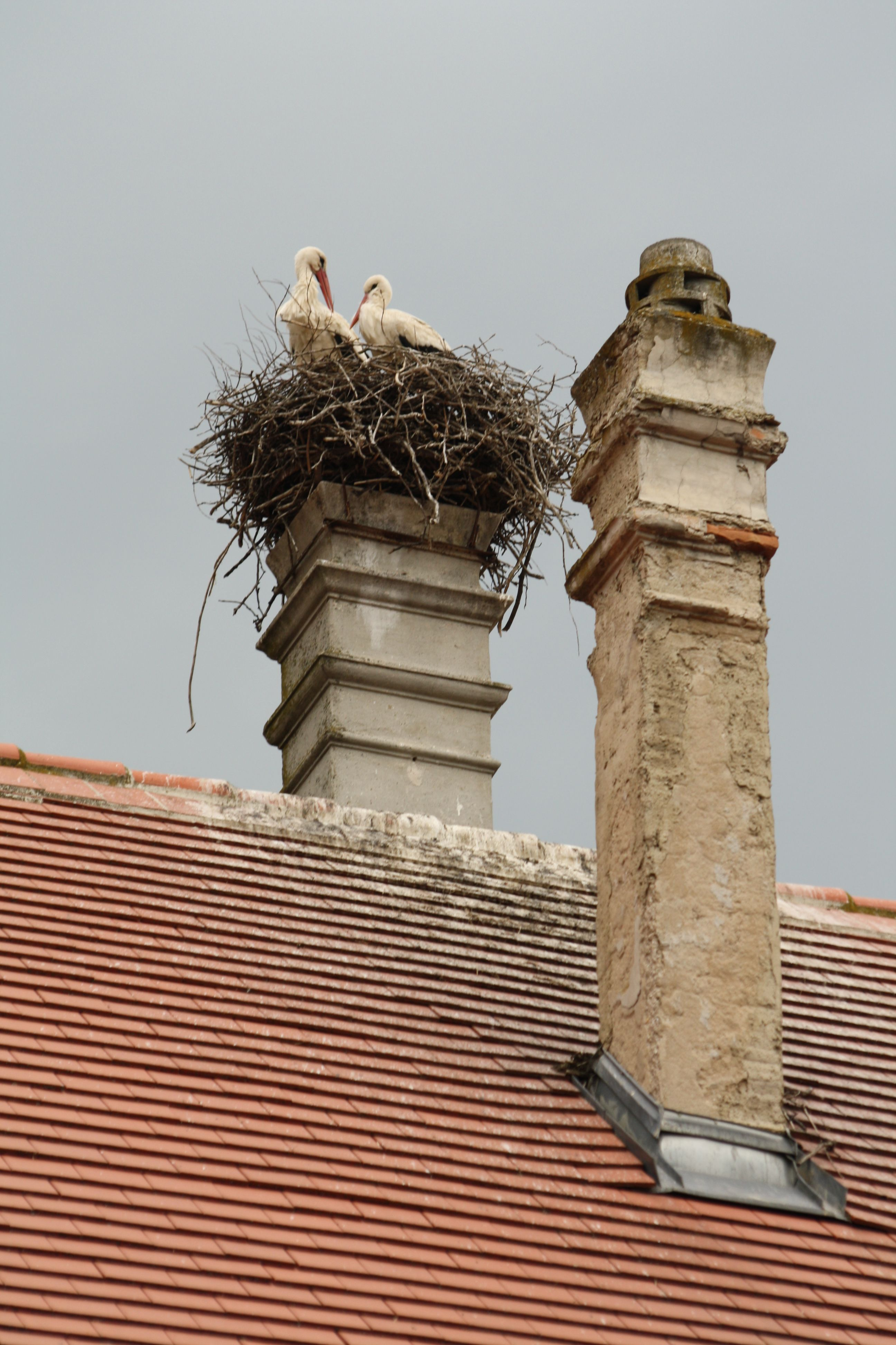 Storch am Schloss Marchegg in Niederösterreich